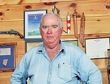 רפאל איתן שנת 2002